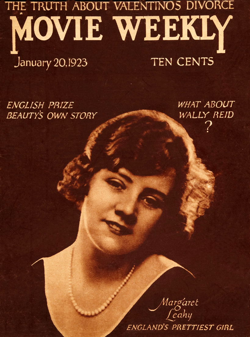 Margaret Leahy